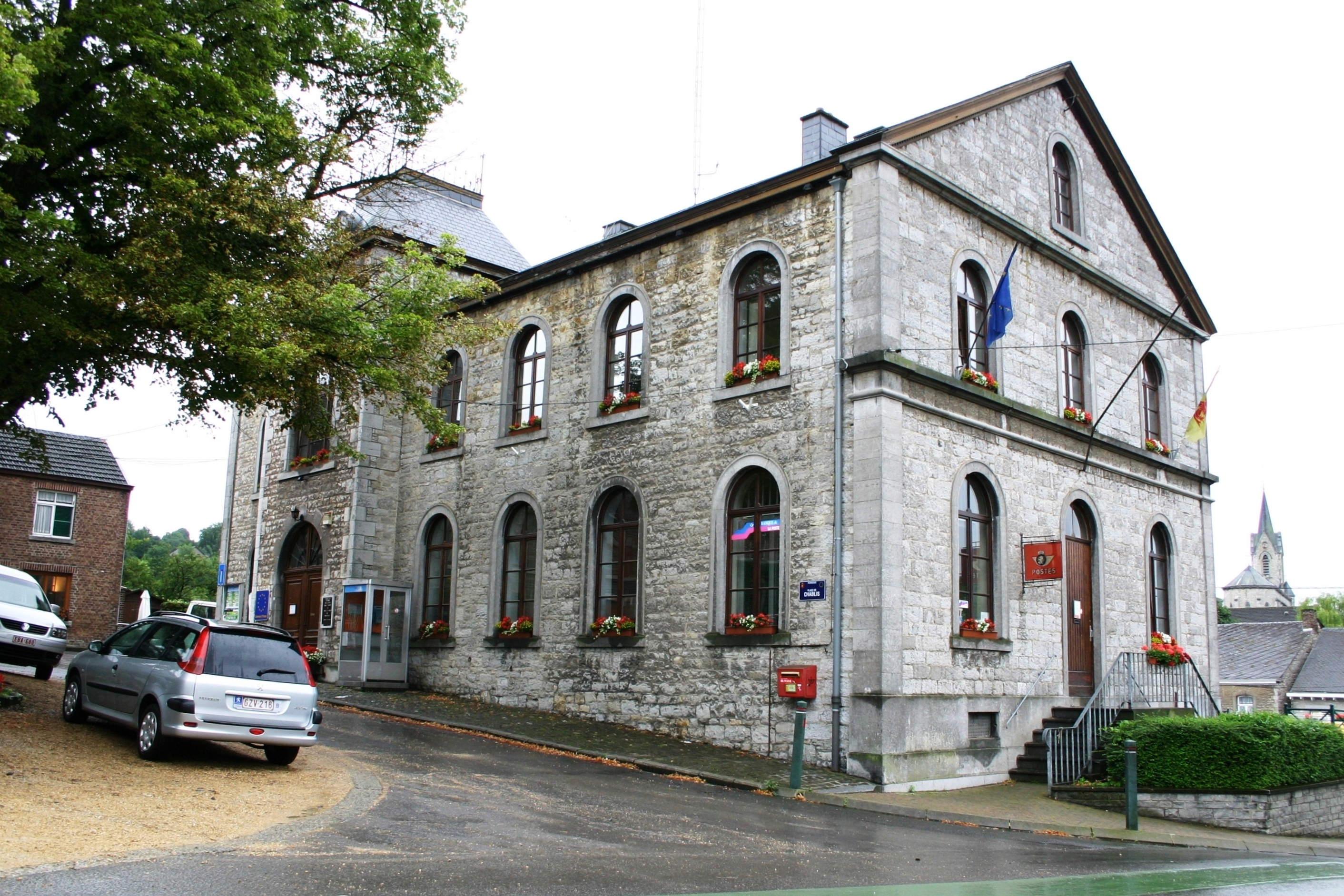 Gemengenhaus vu Ferrières mat am Giewel zur Strossesäit d'Entrée vum Postbüro.